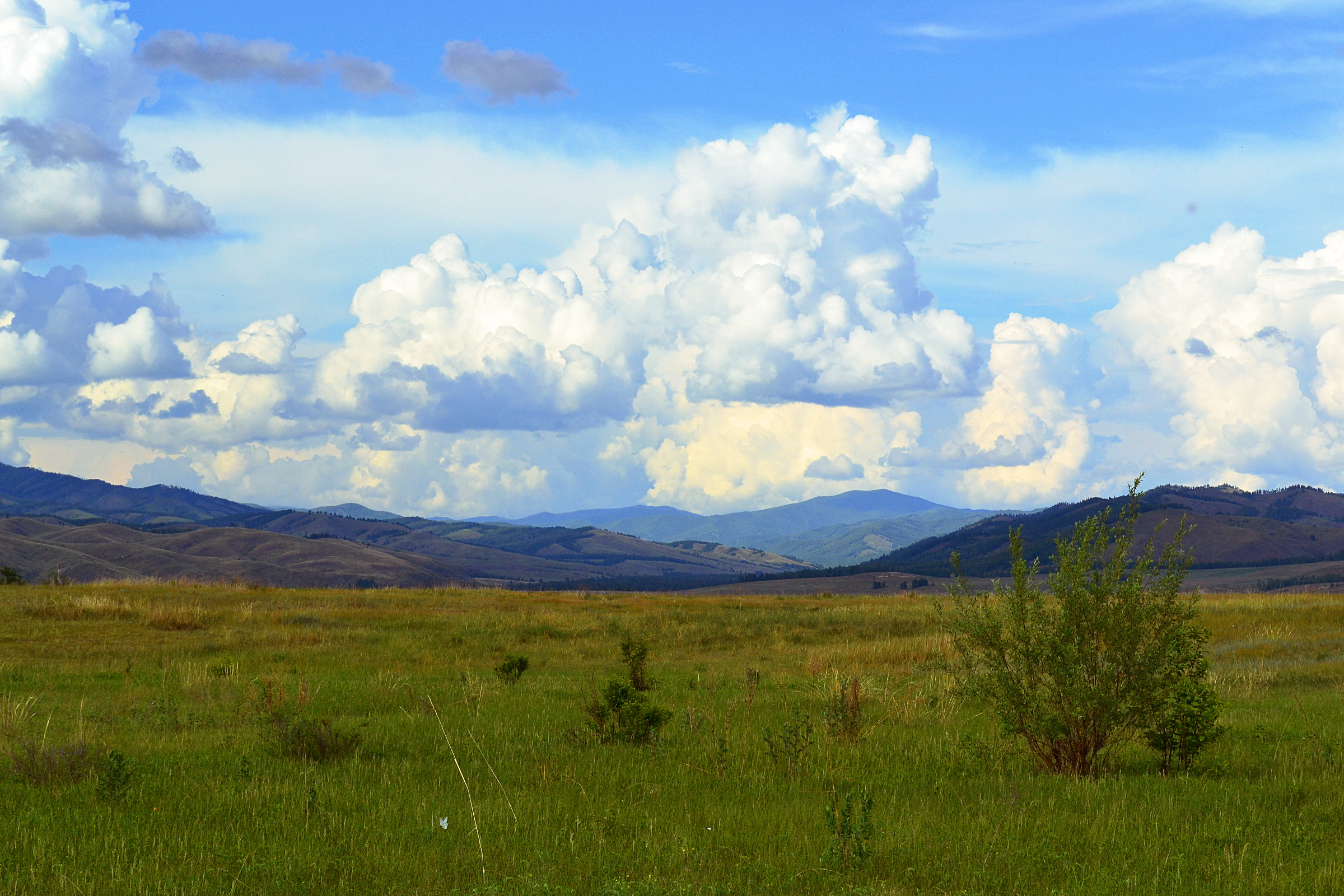 Kaa-Khemskiy r-n, Tyva Republits, Russia